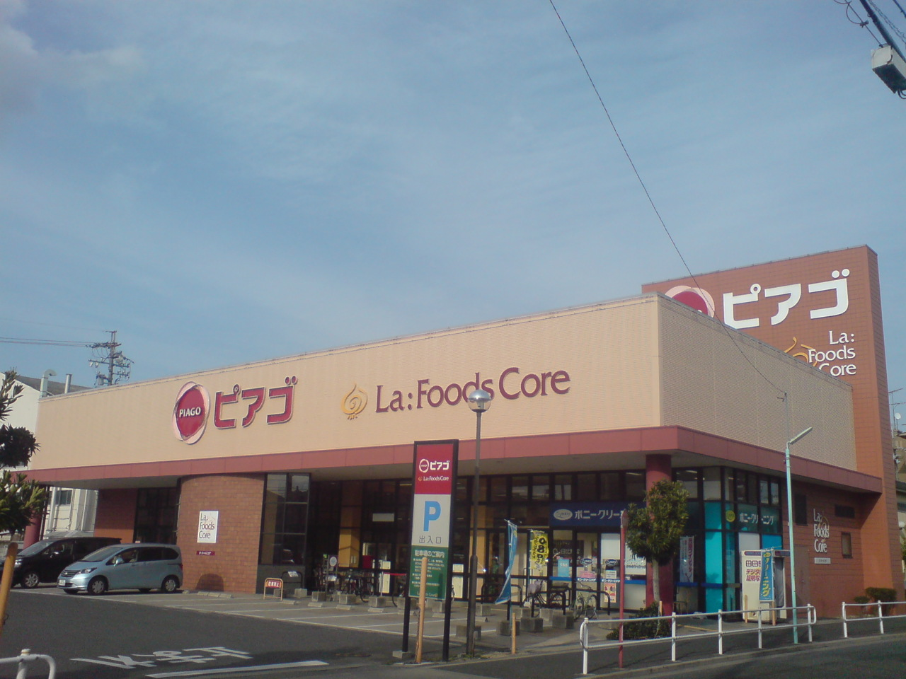 ピアゴ ラ フーズコア神野店店舗外観